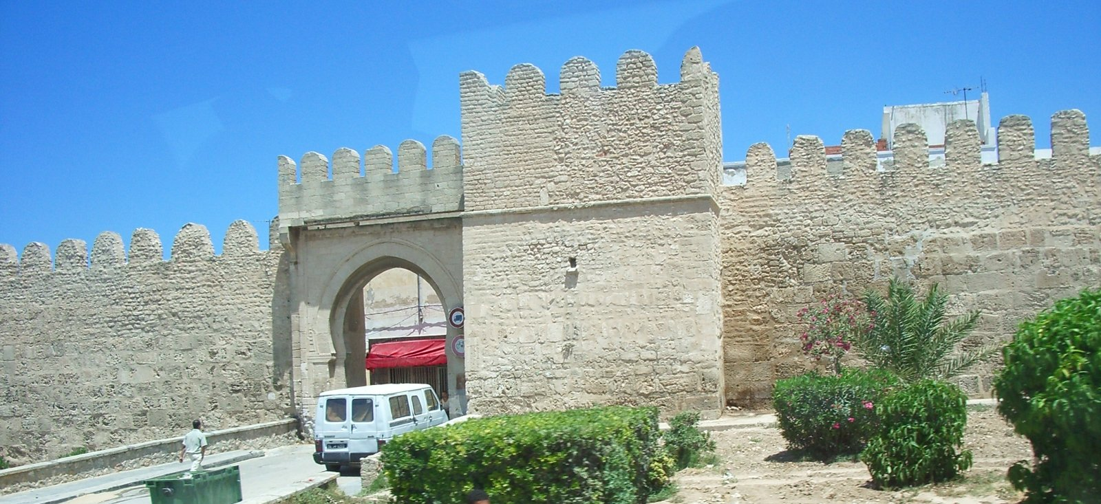 Sussa